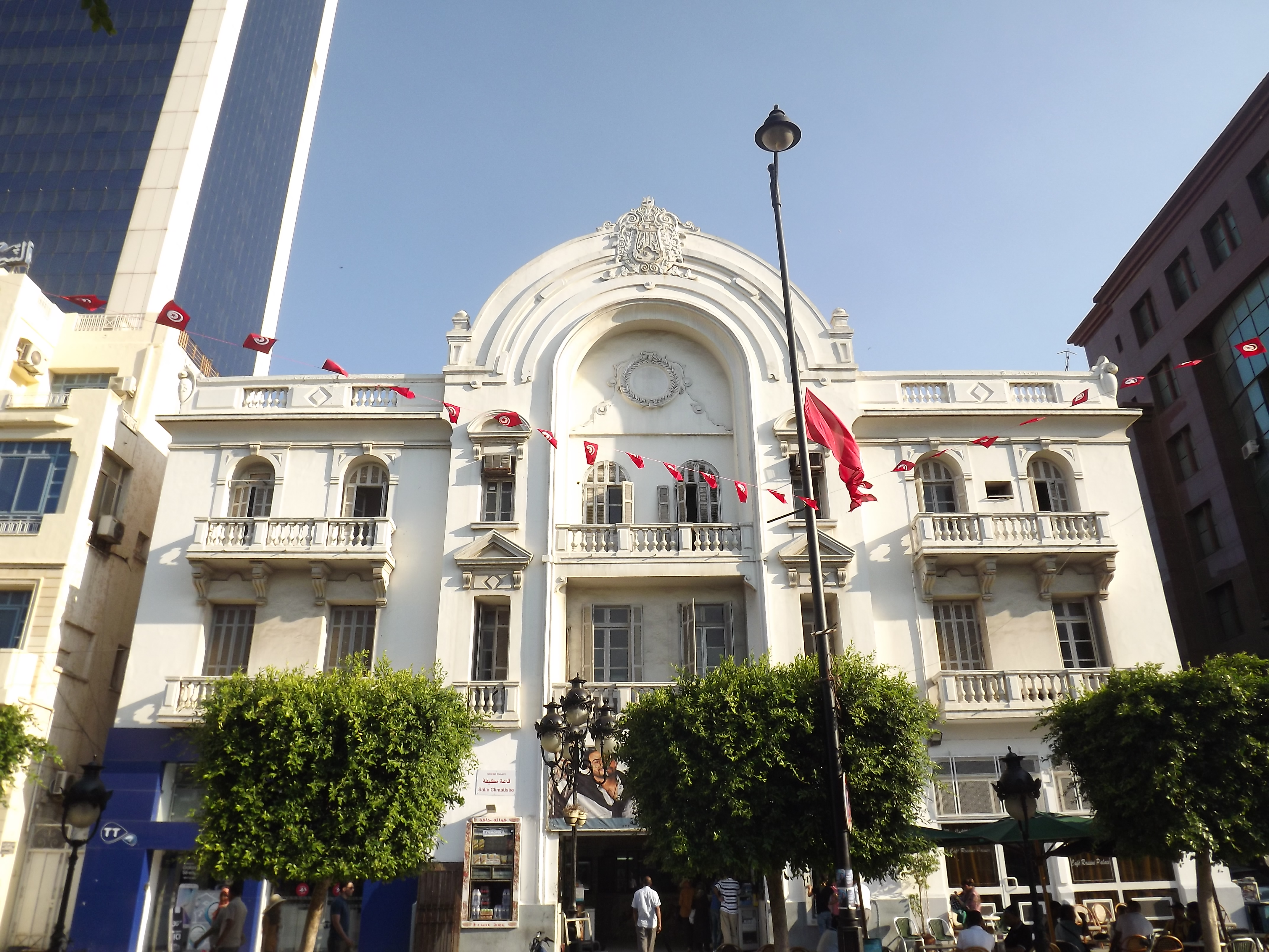 Cinéma le palace